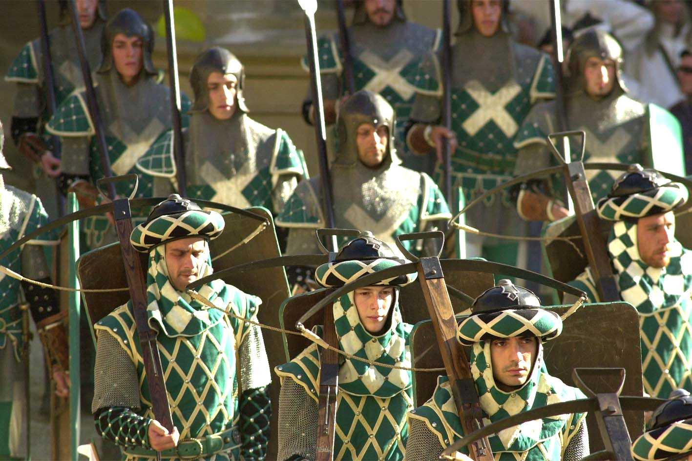 Balestrieri e Armigeri del quartiere di Porta S. Andrea, Giostra del Saracino, Arezzo, Italy